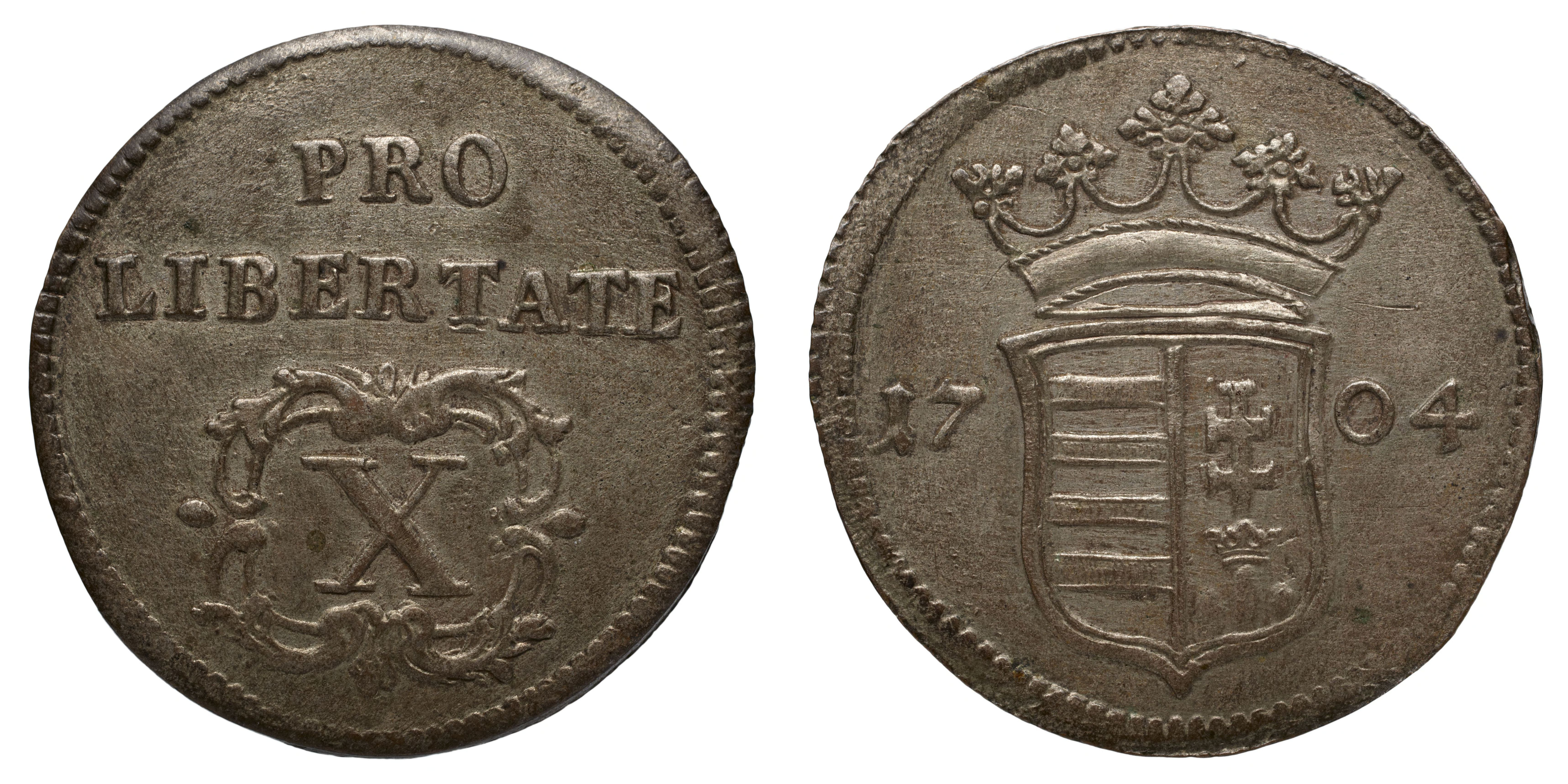 10 poltúrás érem 1704-ből